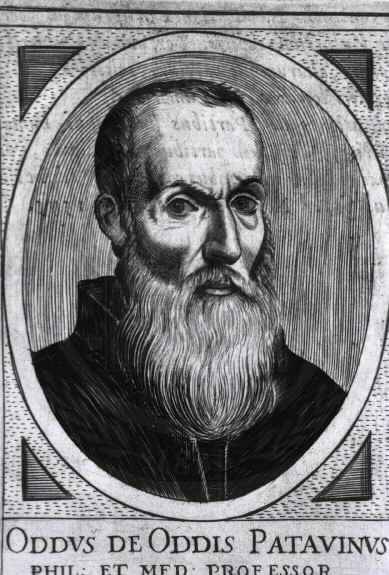 Licenza d'uso